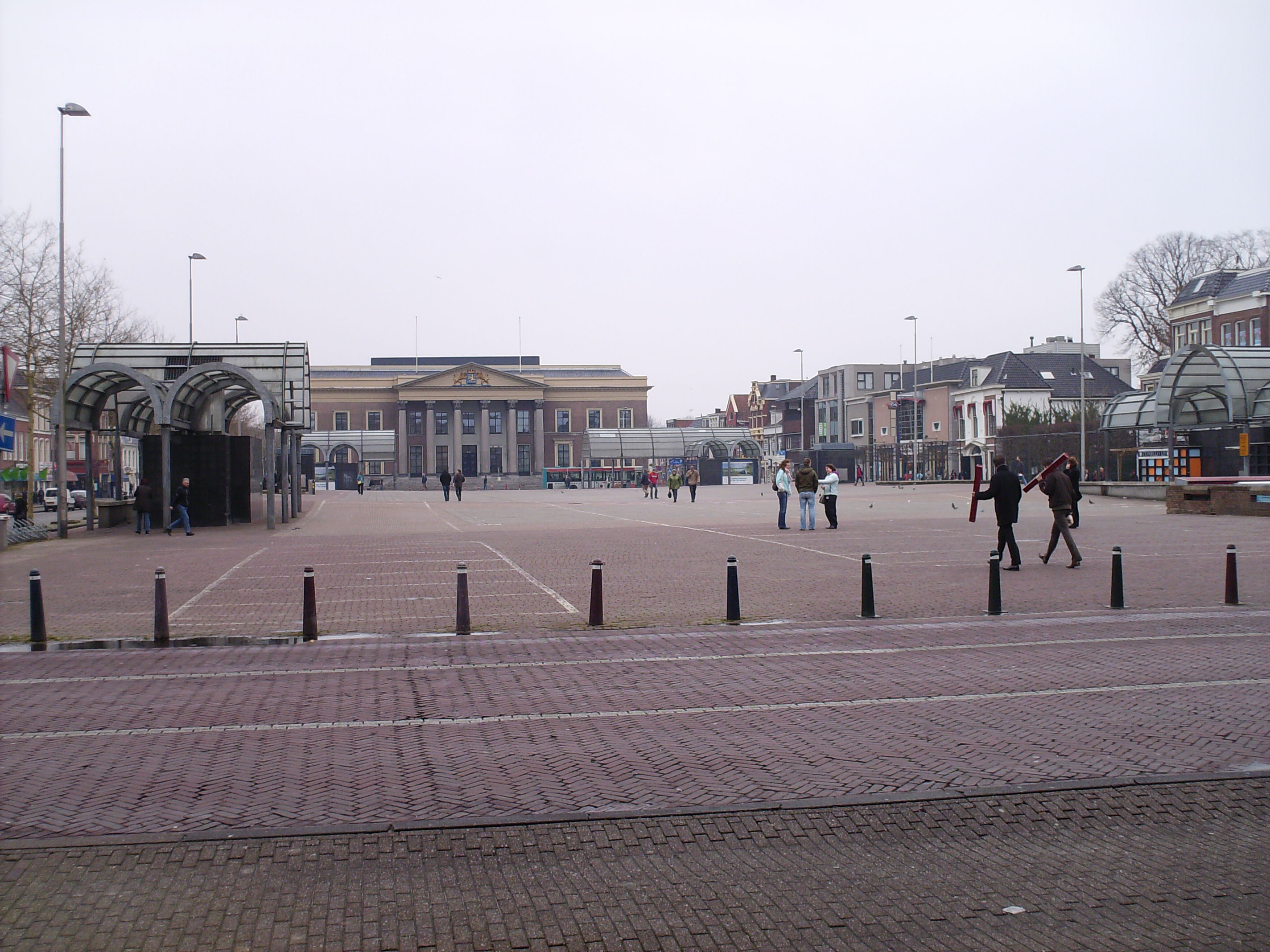 Het Wilhelminaplein in Leeuwarden.